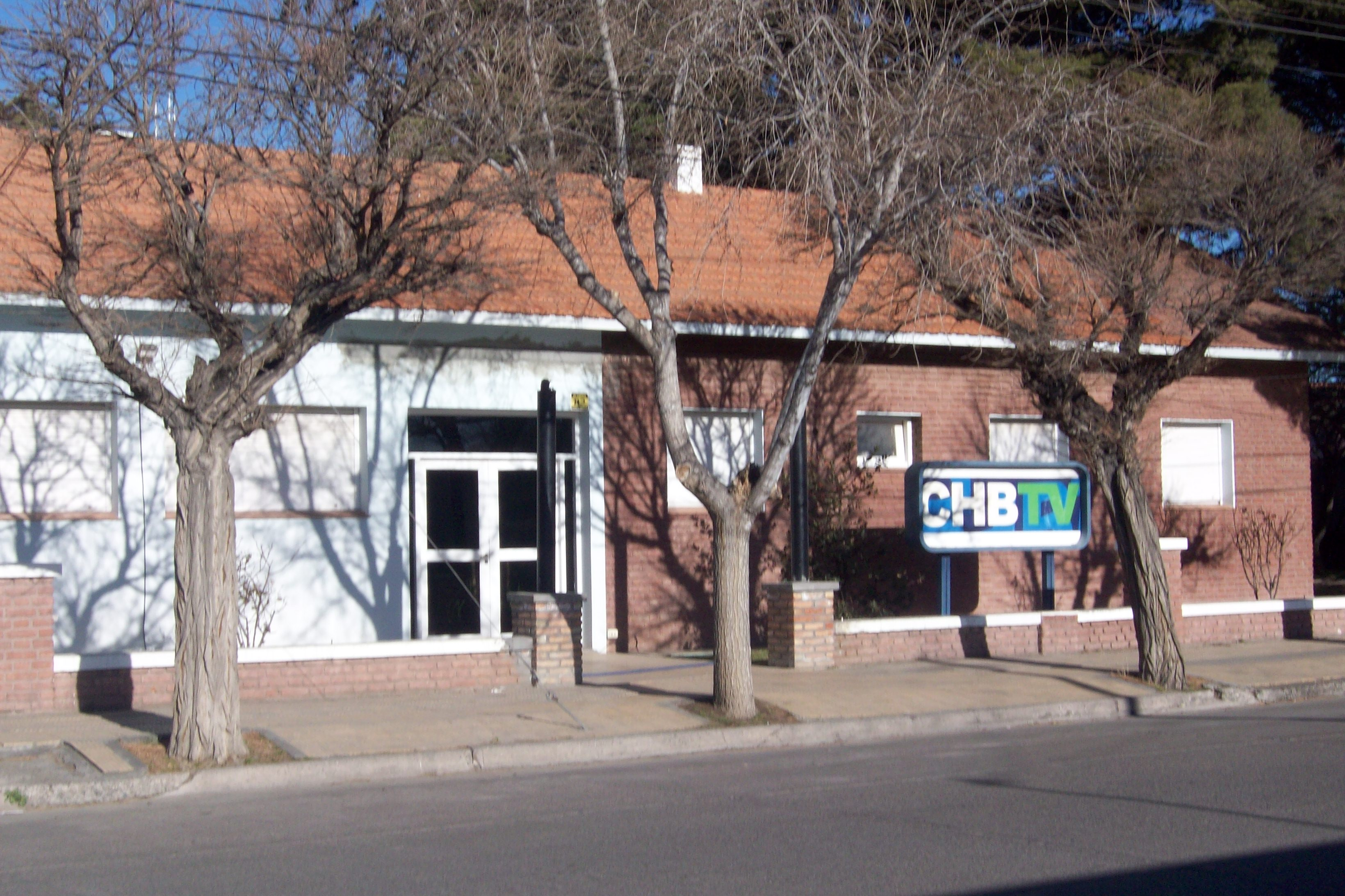 Canal 7